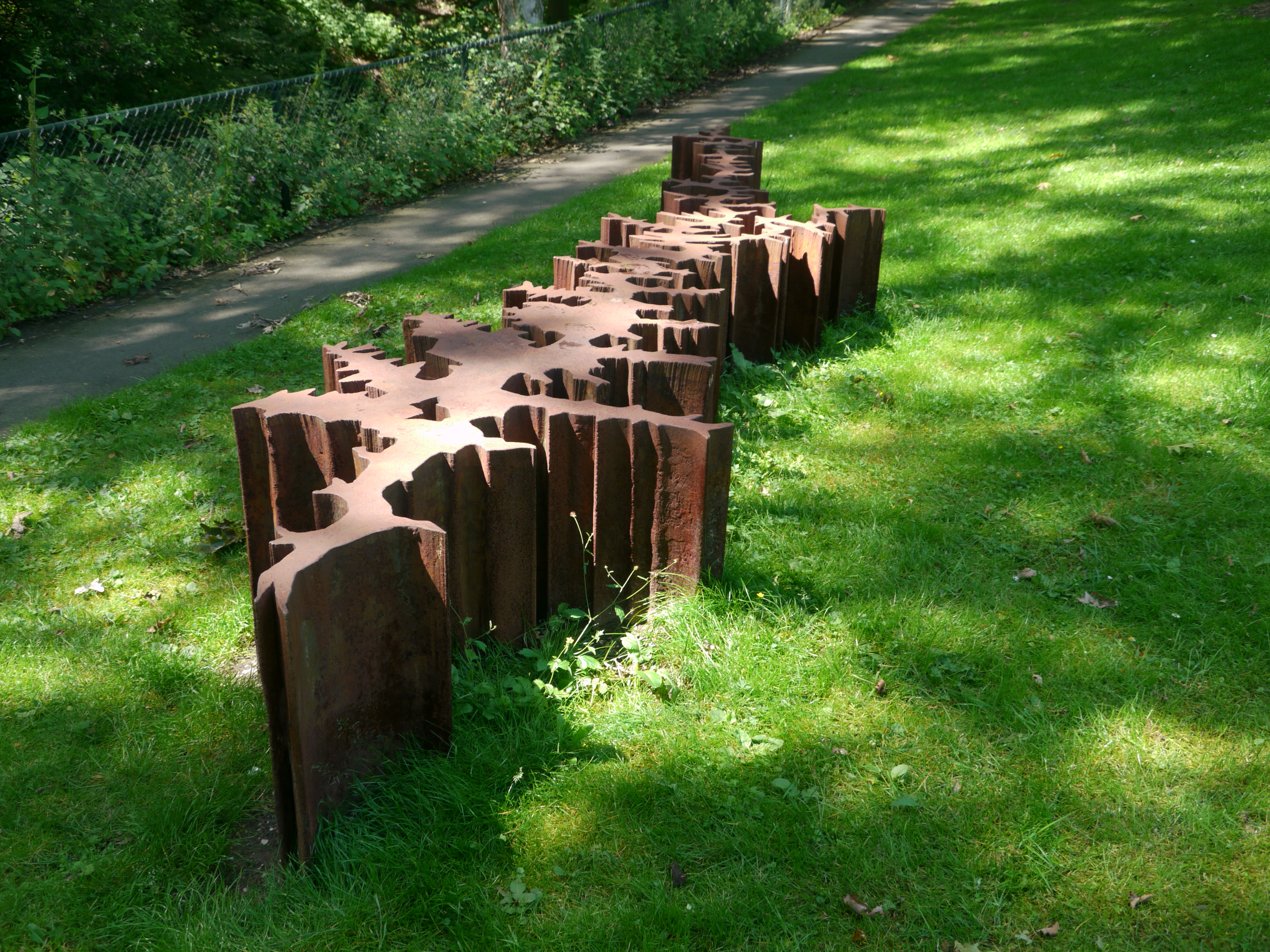 "Meer", kunstwerk van de hand van Carel Visser (2004). Cortenstaal.